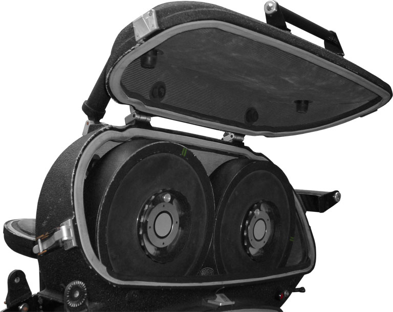 Blimp (schalldämmende Ummantelung einer Filmkamera)